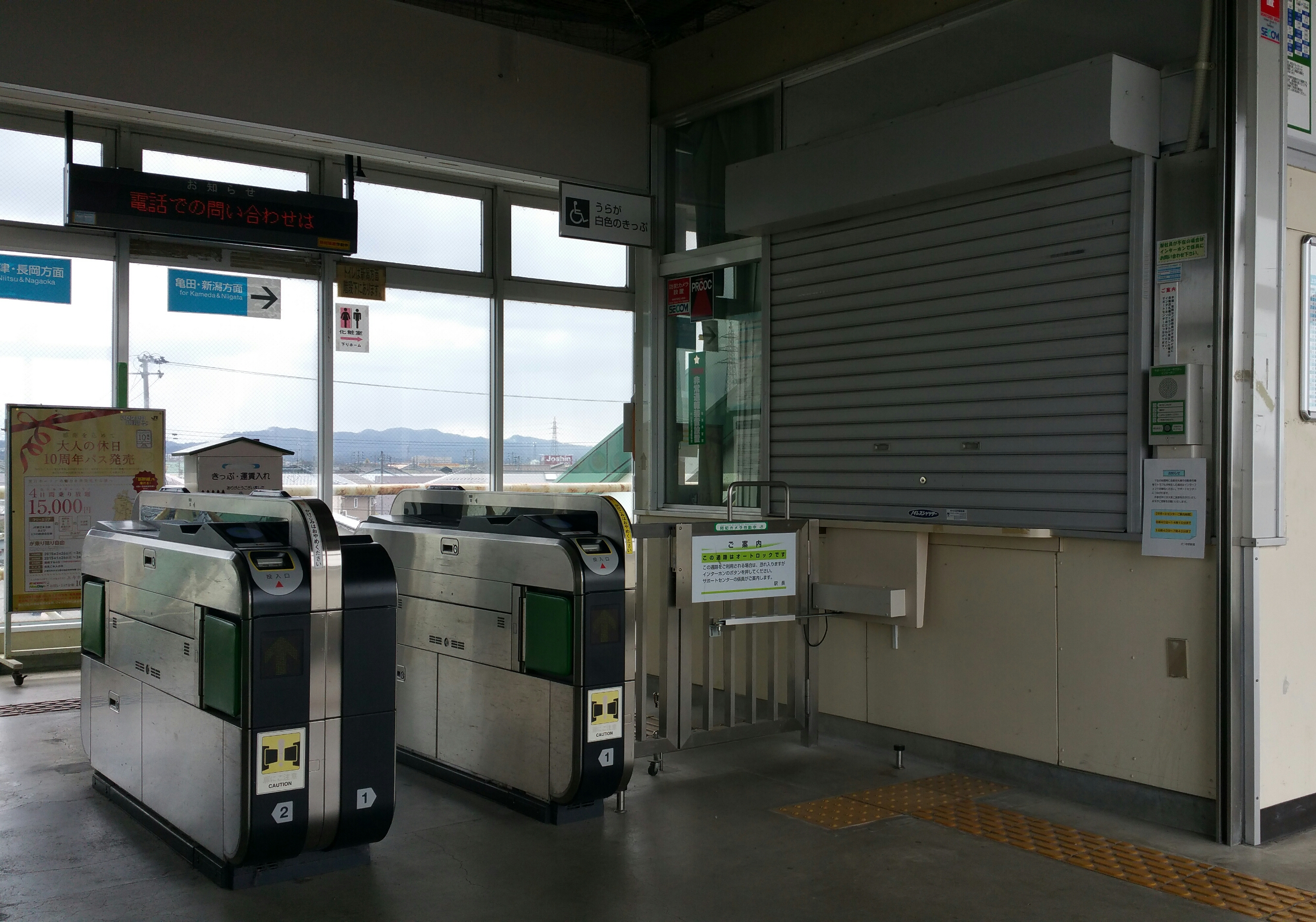 さつき野駅改札（2015年2月）